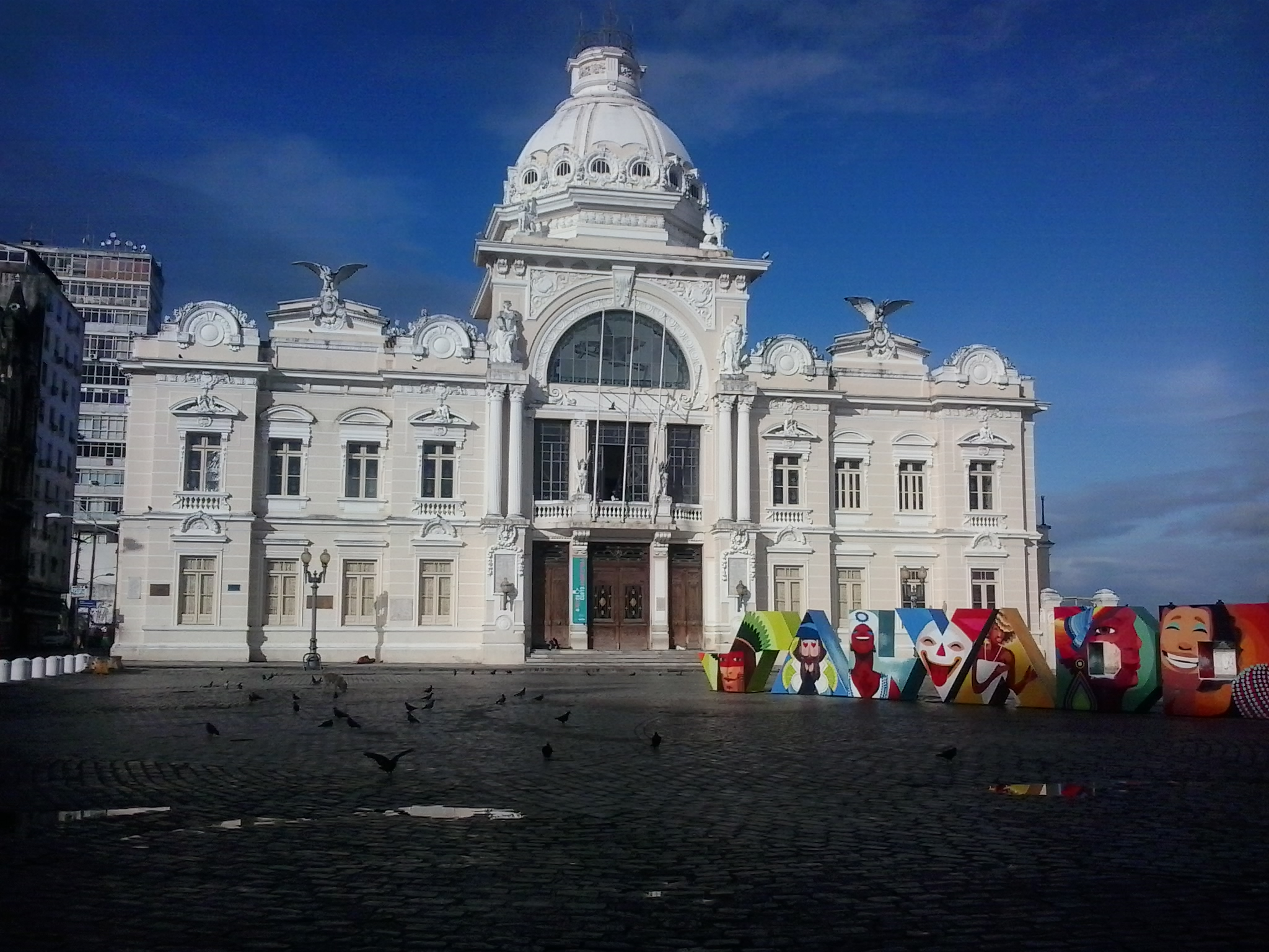 Comercio, Salvador - BA, Brazil